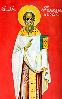 St. Artemon (ortodox icon)